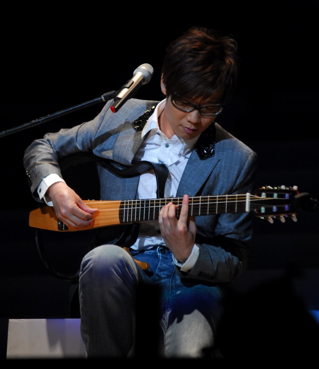 中文（香港）: 攝於品冠愛情在香港轉機演唱會2009年2月18日